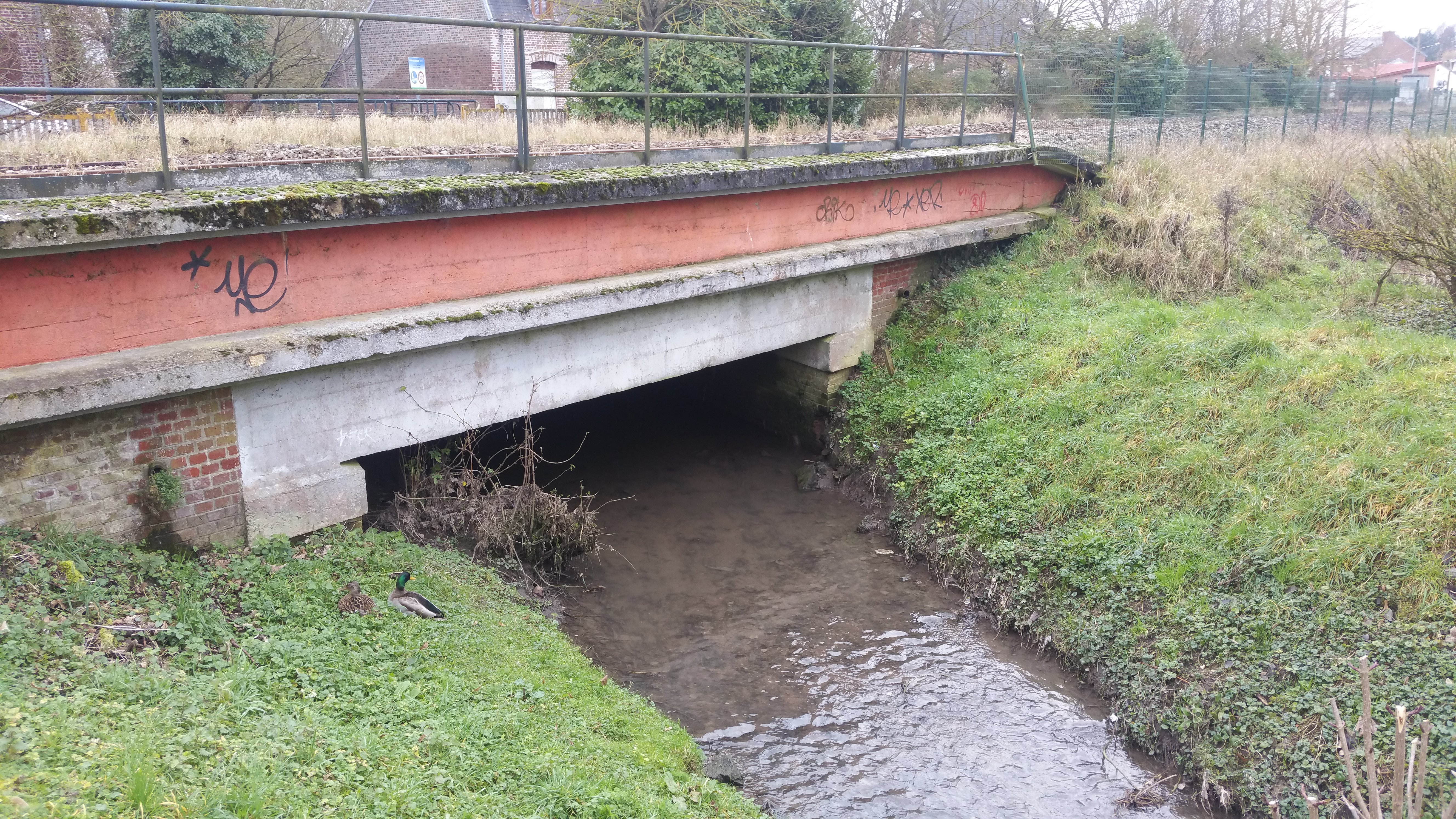 Vue du Crinchon à Achicourt, à proximité de l'ancienne halte ferroviaire.